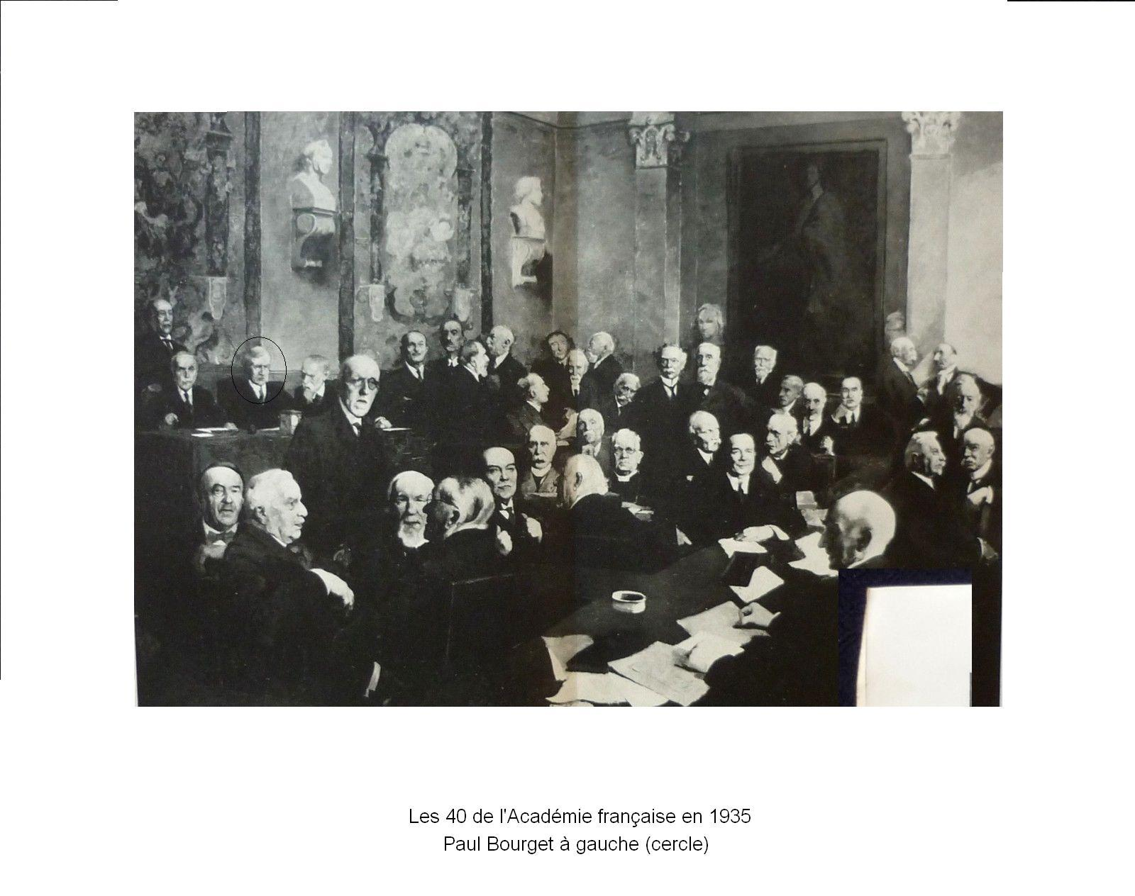 L'Académie française en 1935